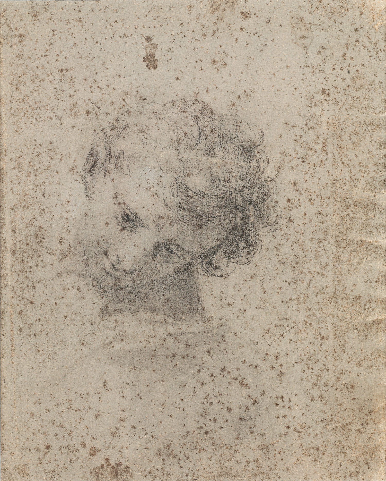 Dibuija de cabeza masculina, de Mariano Salvador Maella.